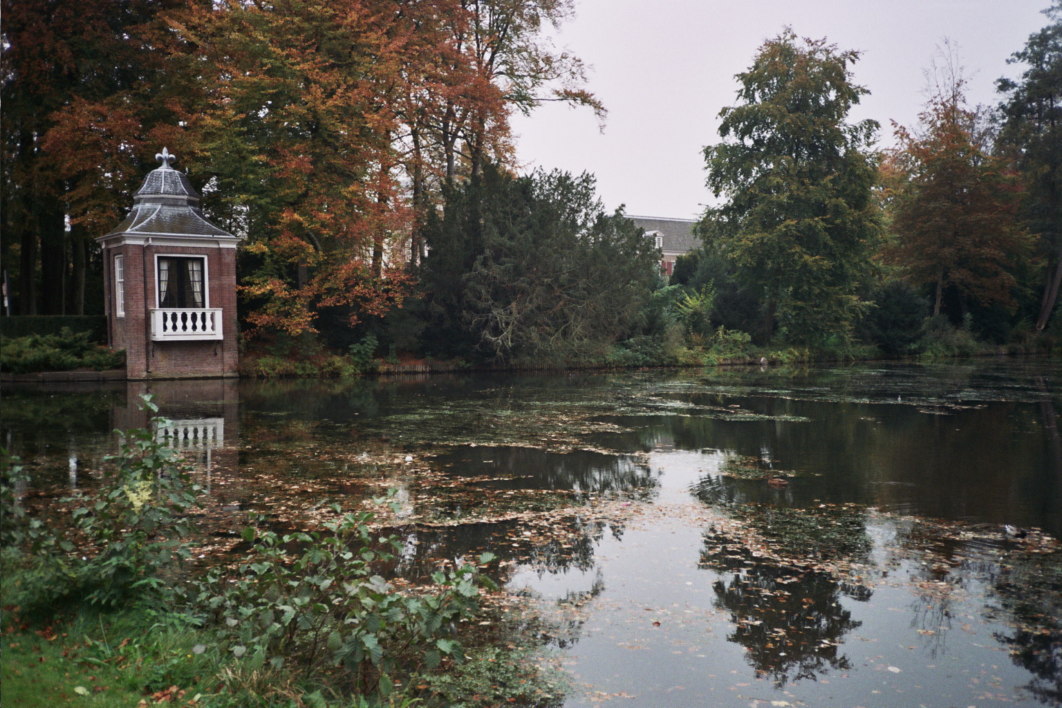 Engelse Tuin en theekoepel bij Slot Zeist, Nederland